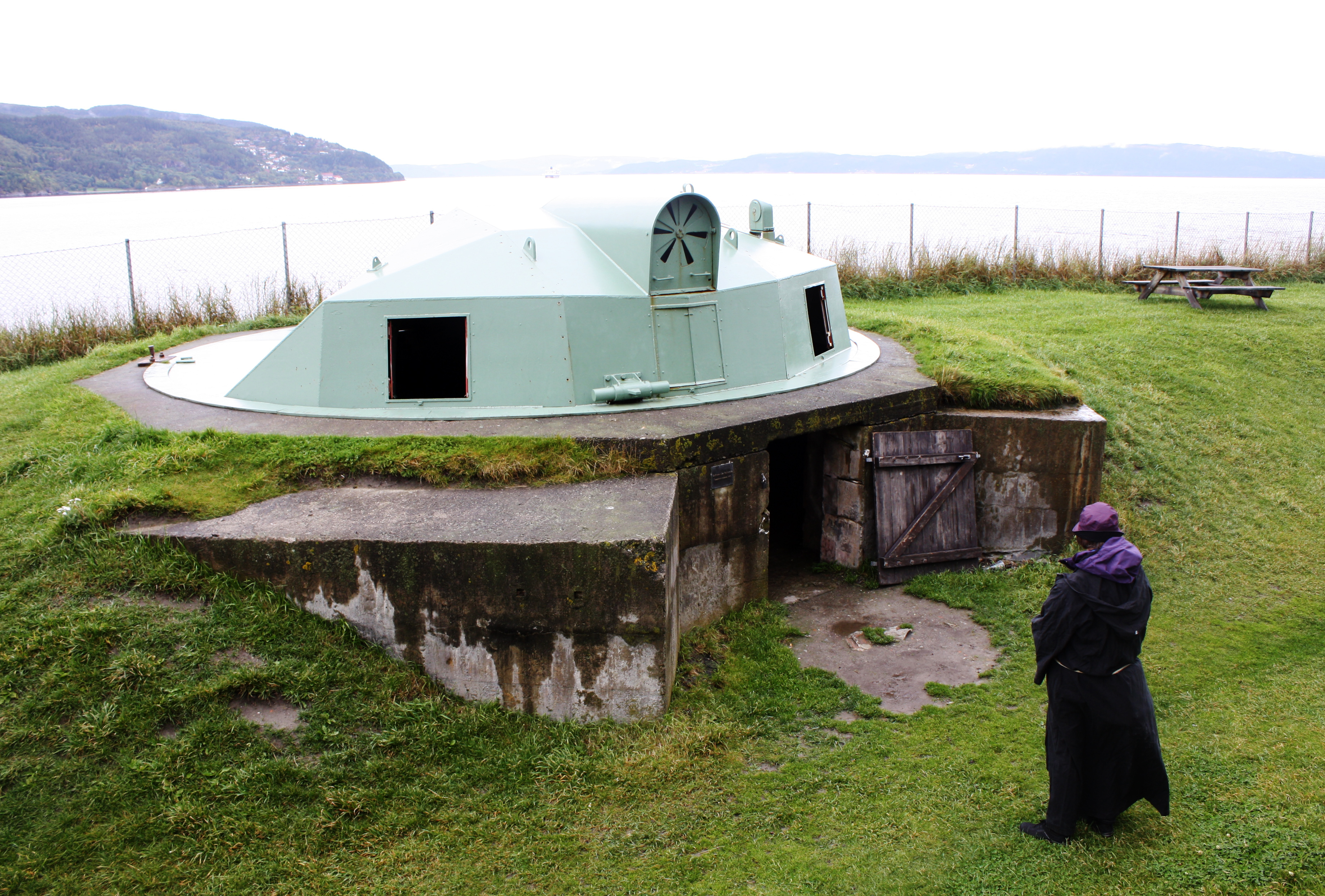 Luftvernkanonen som ble installert av tyskerne på Munkholmen utenfor Trondheim i 1943.